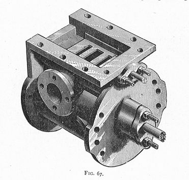 Slide-valve cylinder, three-quarter view (Heat Engines, 1913).jpg